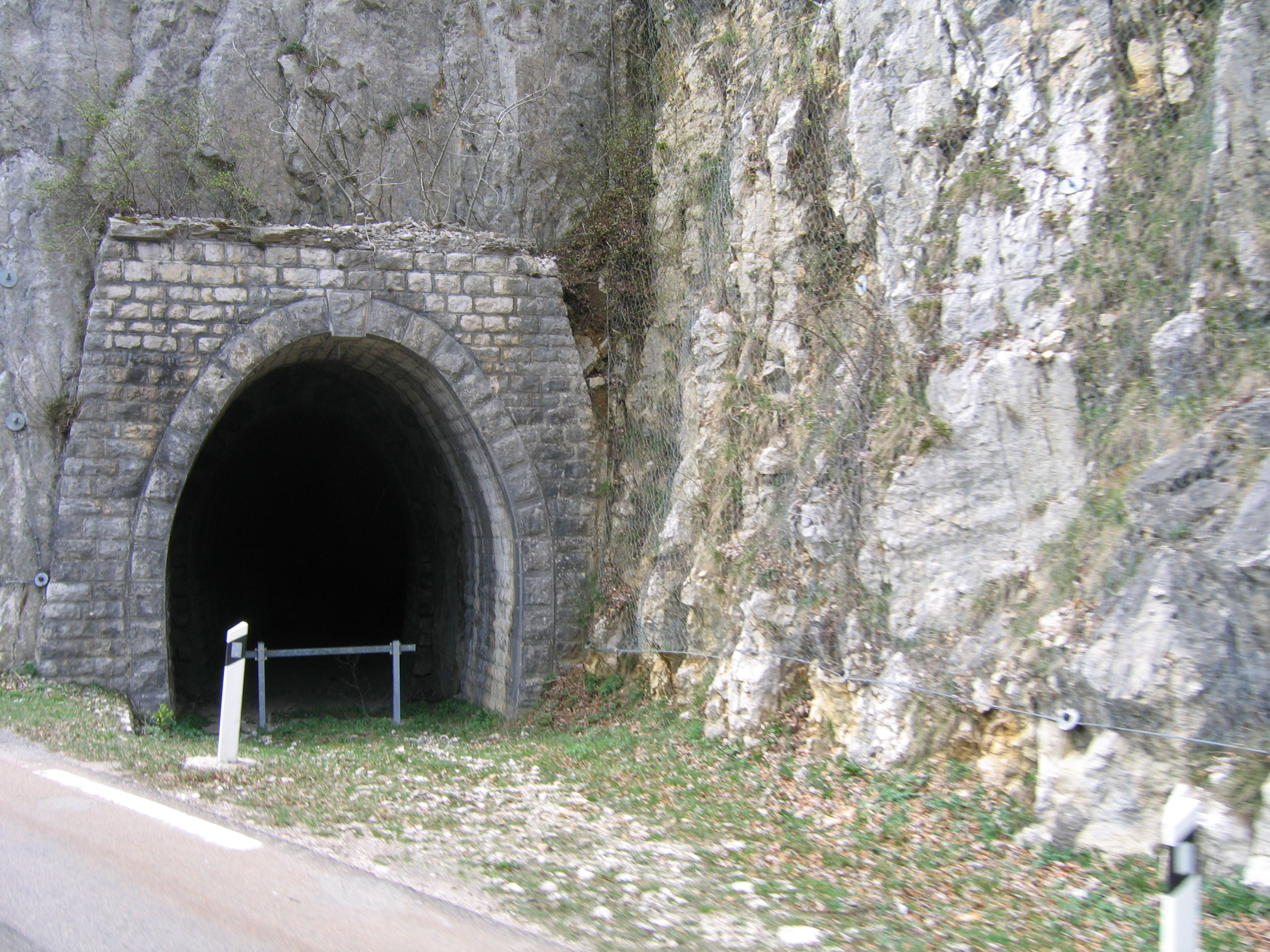 Portail amont du tunnel Turu.